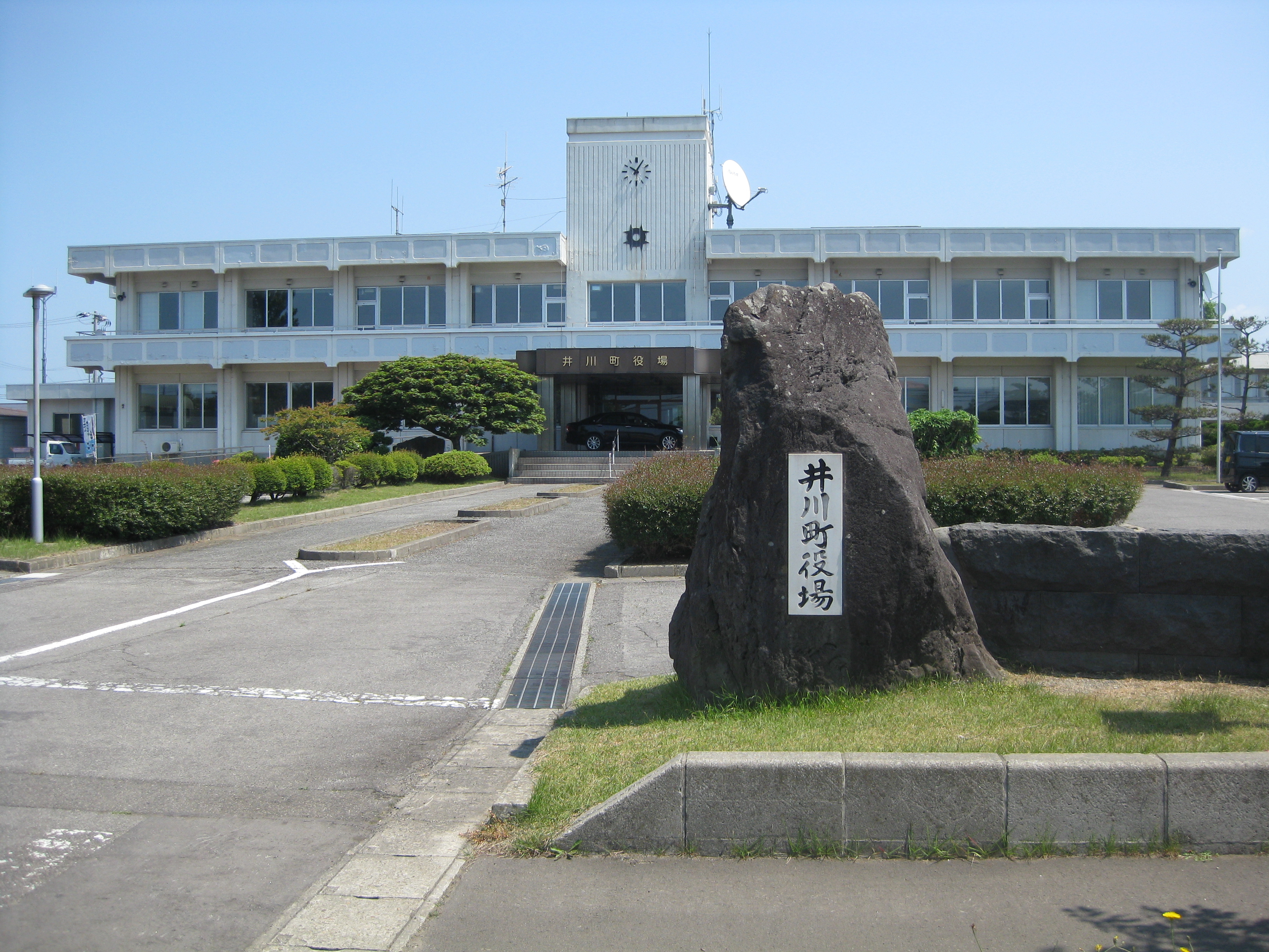 井川町役場